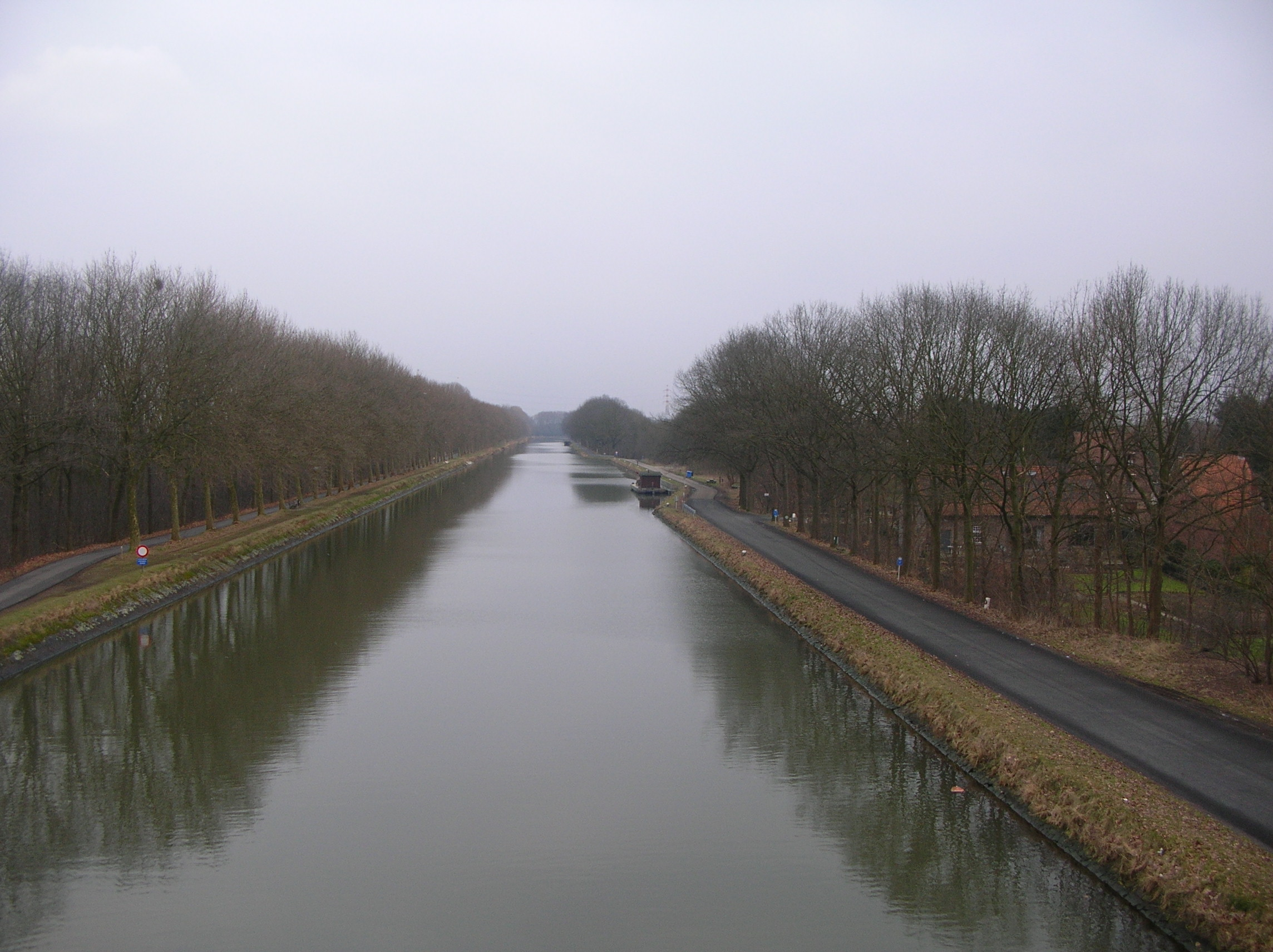 Foto genomen op de brug van Sint-Huibrechts-Lille (richting Bochelt)